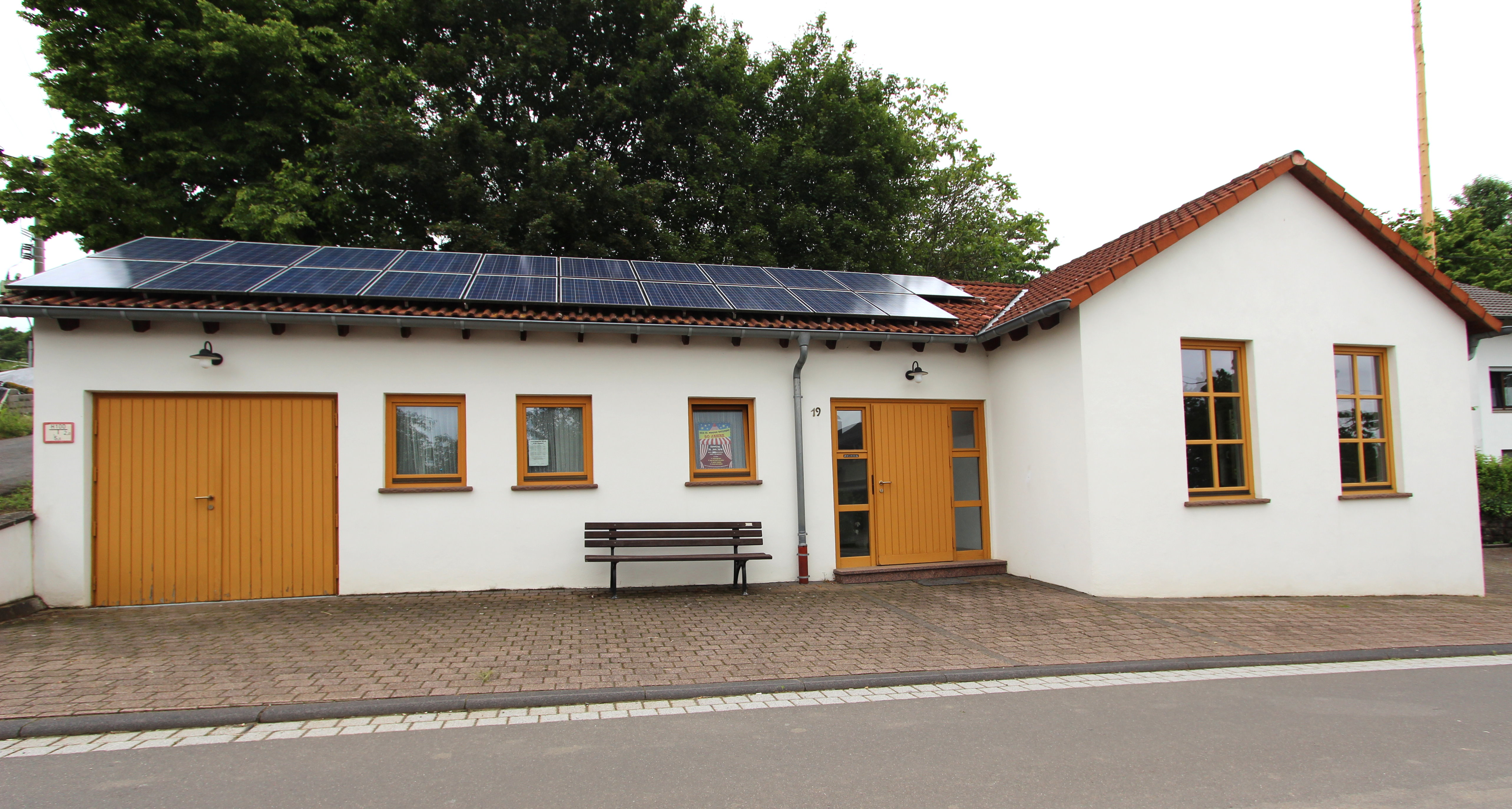 D-54646 Olsdorf; Feuerwehr- und Bürgerhaus Dorfstraße 19. Aufnahme aus Süden von 2016.